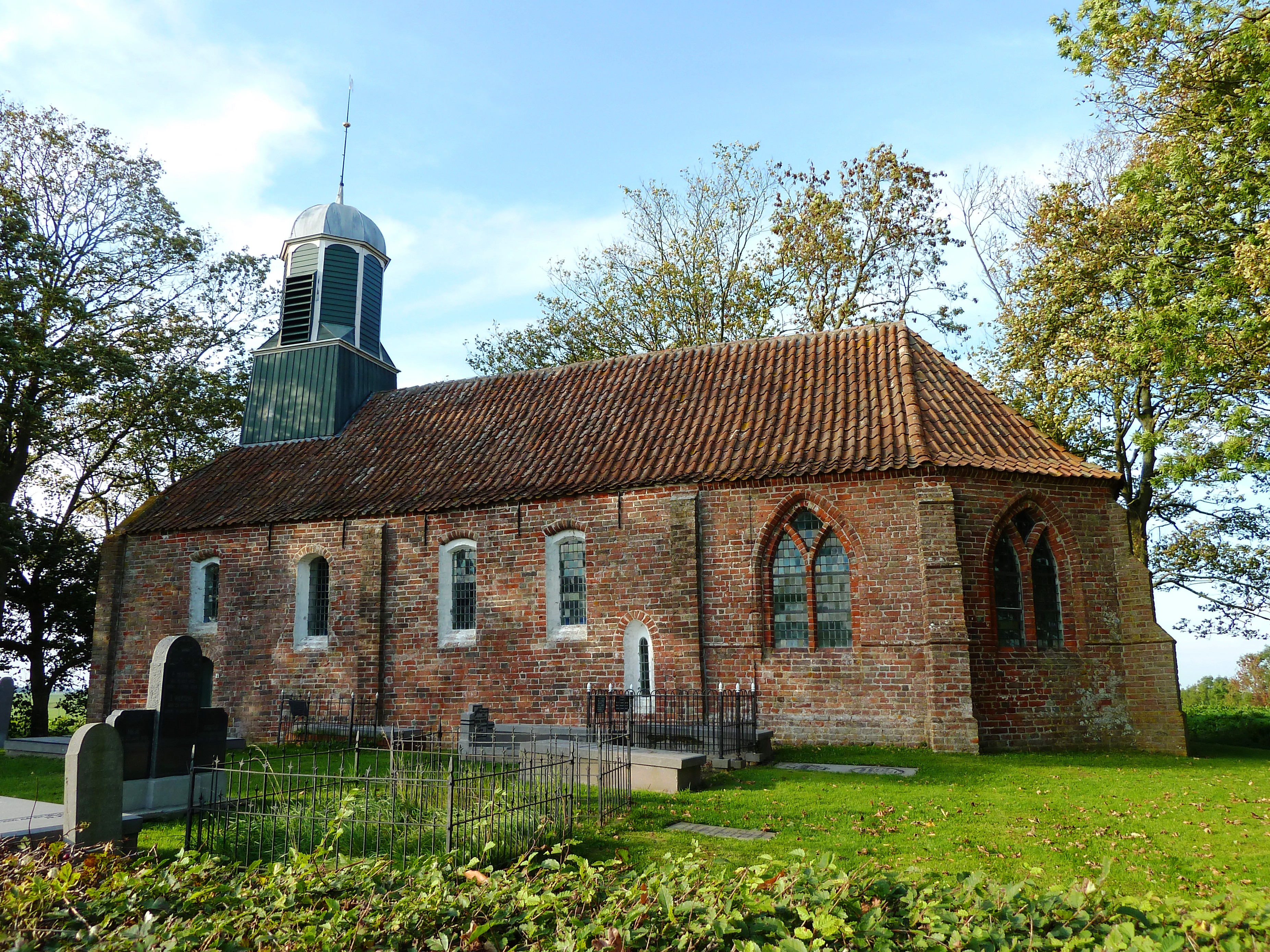 Fransumerweg 4, Kerk van Fransum.